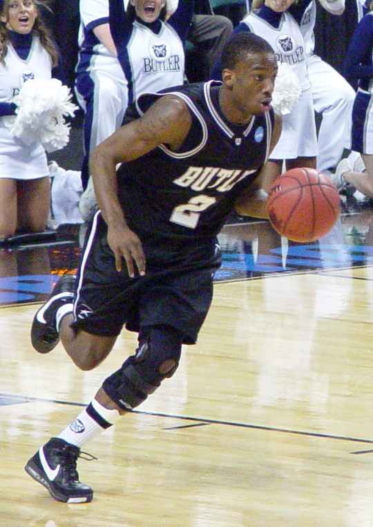 Shawn Vanzant